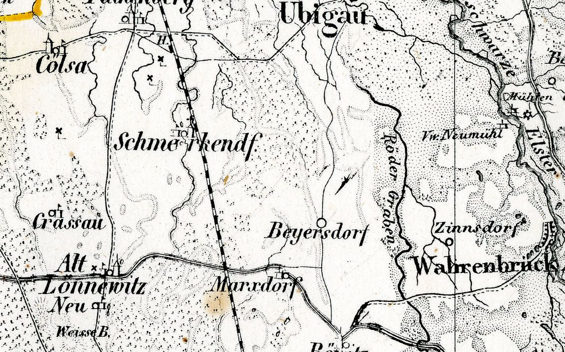 Lage von Alt- und Neu-Lönnewitz im Kreis Liebenwerda